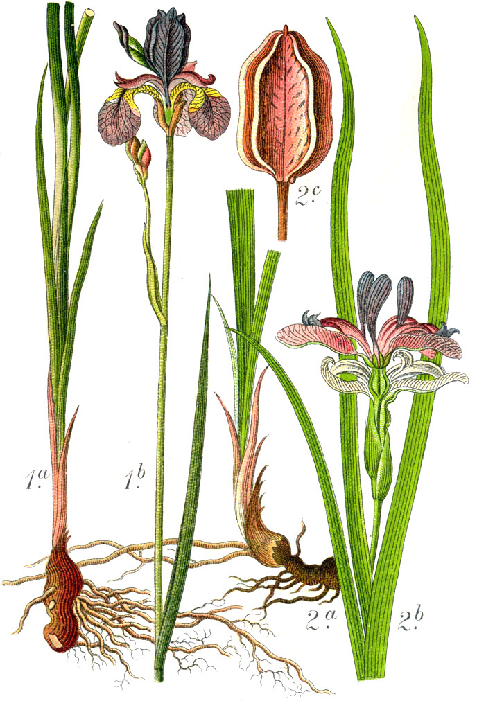 1. Iris sibirica L. 2. Iris graminea L. Original Caption 1. Sibirische Schwertlilie, Iris sibirica 2. Grasahnliche Schwertlilie, Iris graminea